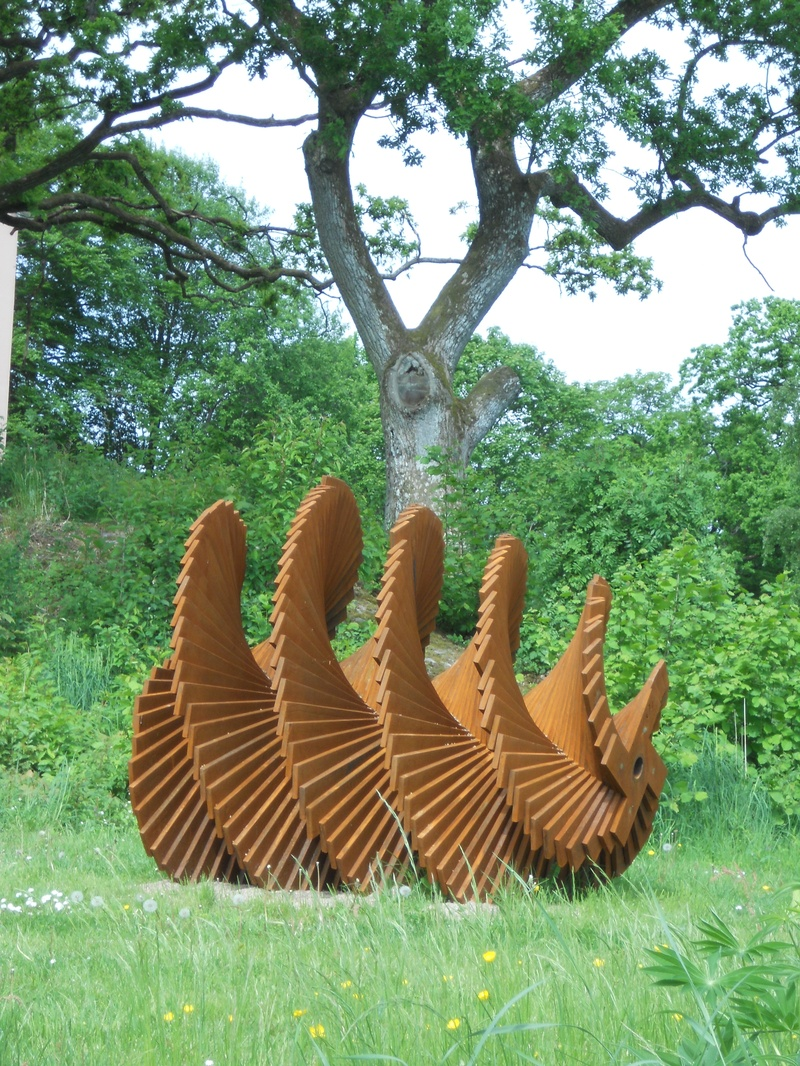 Tournesol(solros) i Holzhausens park, Vänersborg 2012.